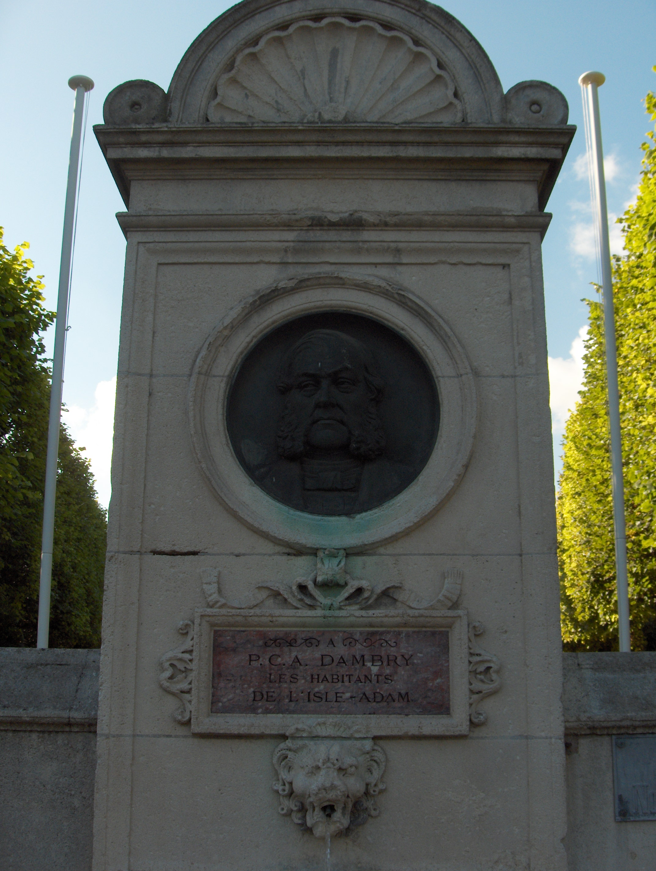 Fontaine en l'honneur du bienfaiteur et maire de L'Isle-Adam (Val-d'Oise) Charles Dambry